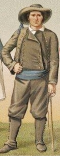 Homme de Pleyben : cet habillement sévère est tout en drap, y compris les longues guêtres ; la ceinture est de laine et le chapeau en feutre (dessin d'Albert Racinet publié en 1888).